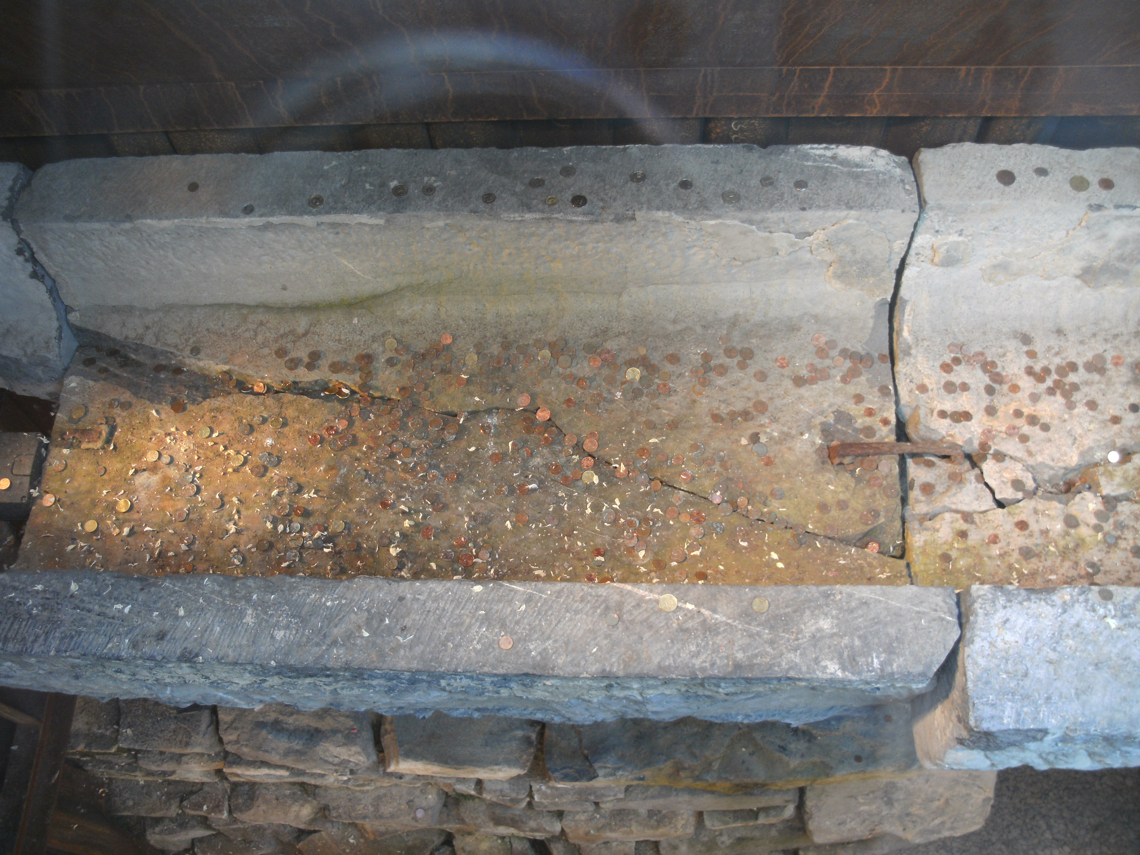 Ehemaliger Paukanal in Aachen